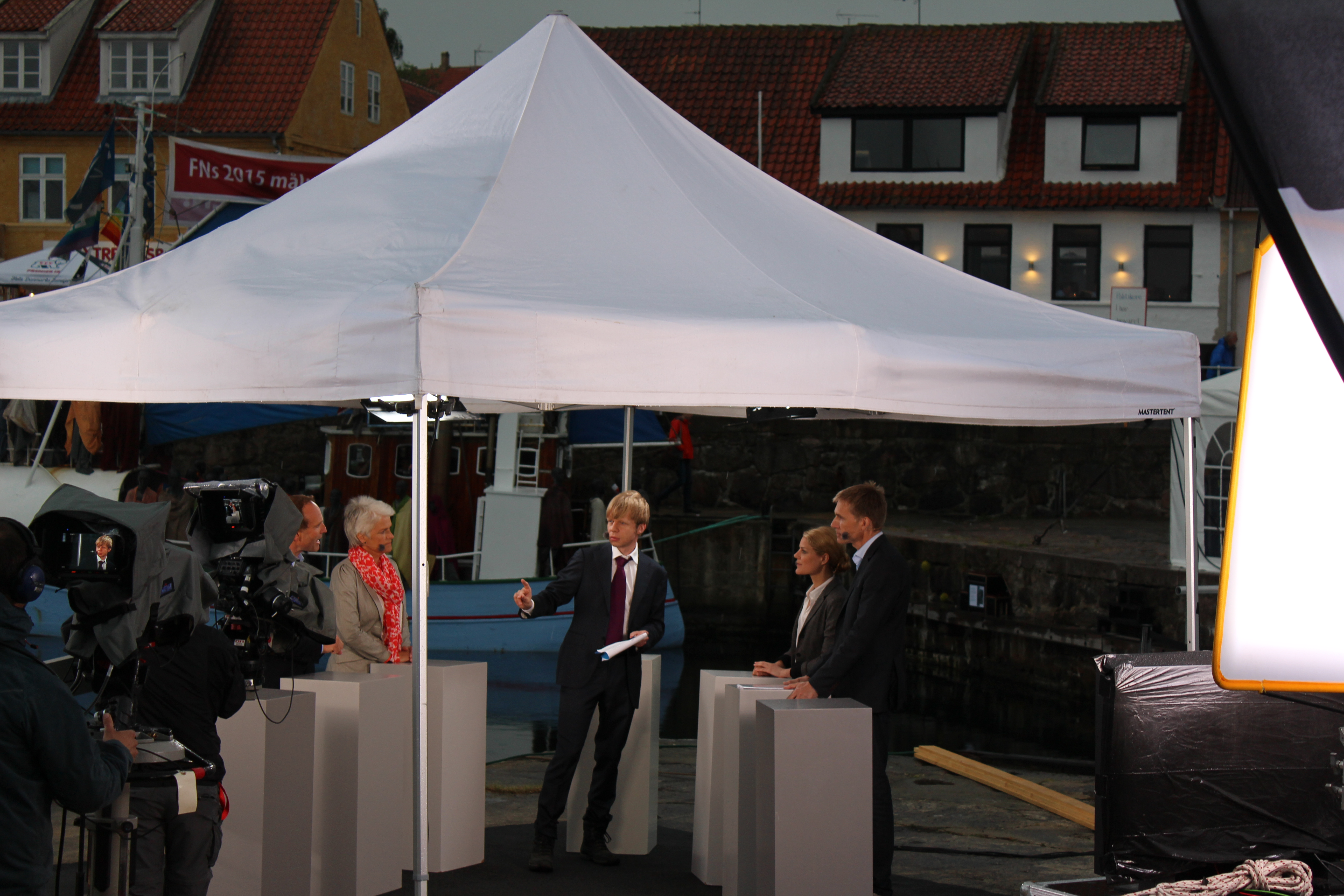 Gæster: Johanne Schmidt Nielsen Kristian Thulesen Dahl Søren Pind Annette Vilhelmsen Martin Lidegaard Lars Barfoed Simon Emil Ammitzbøl